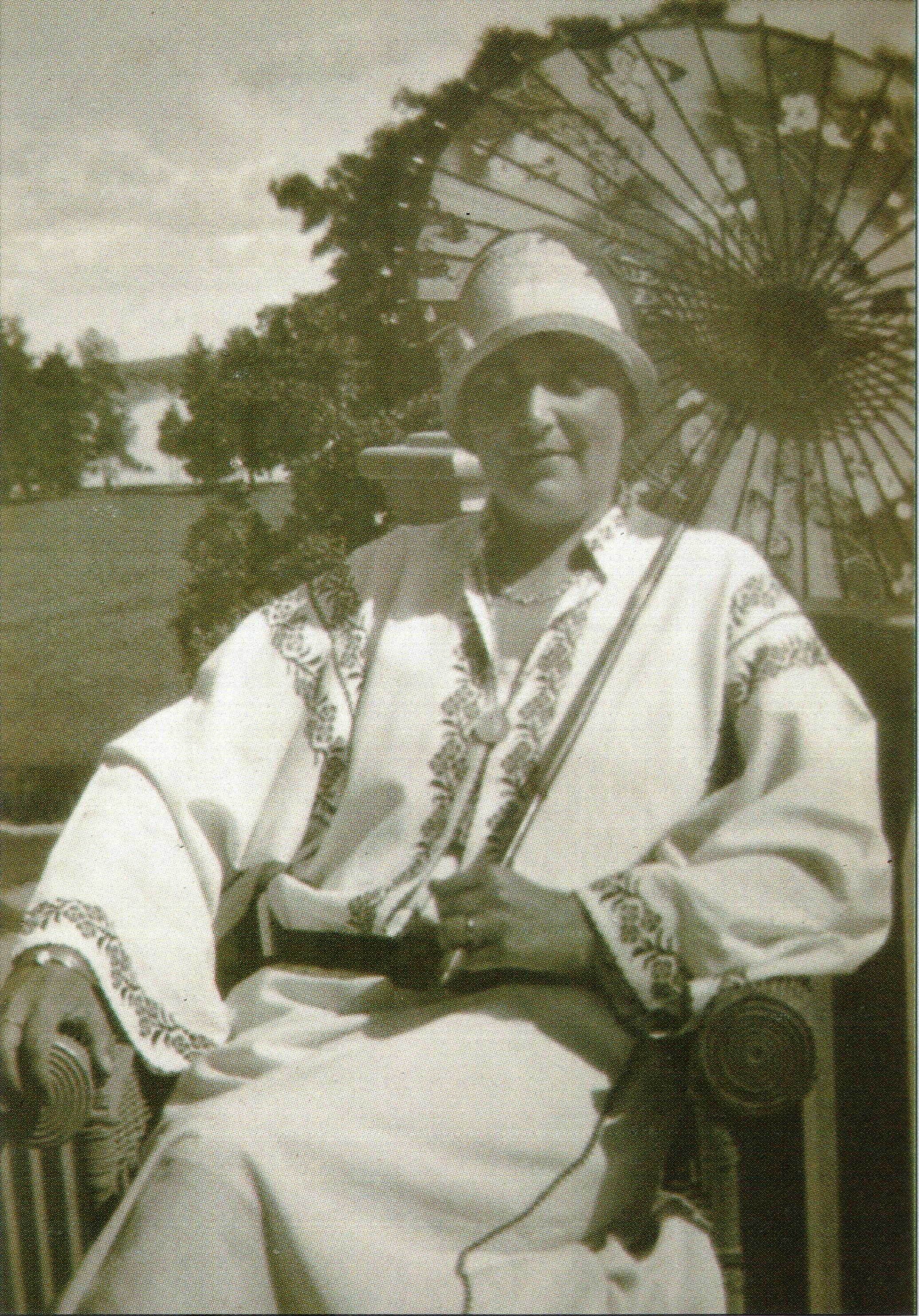 Tasavallan presidentin puoliso Signe Relander Kultarannassa.